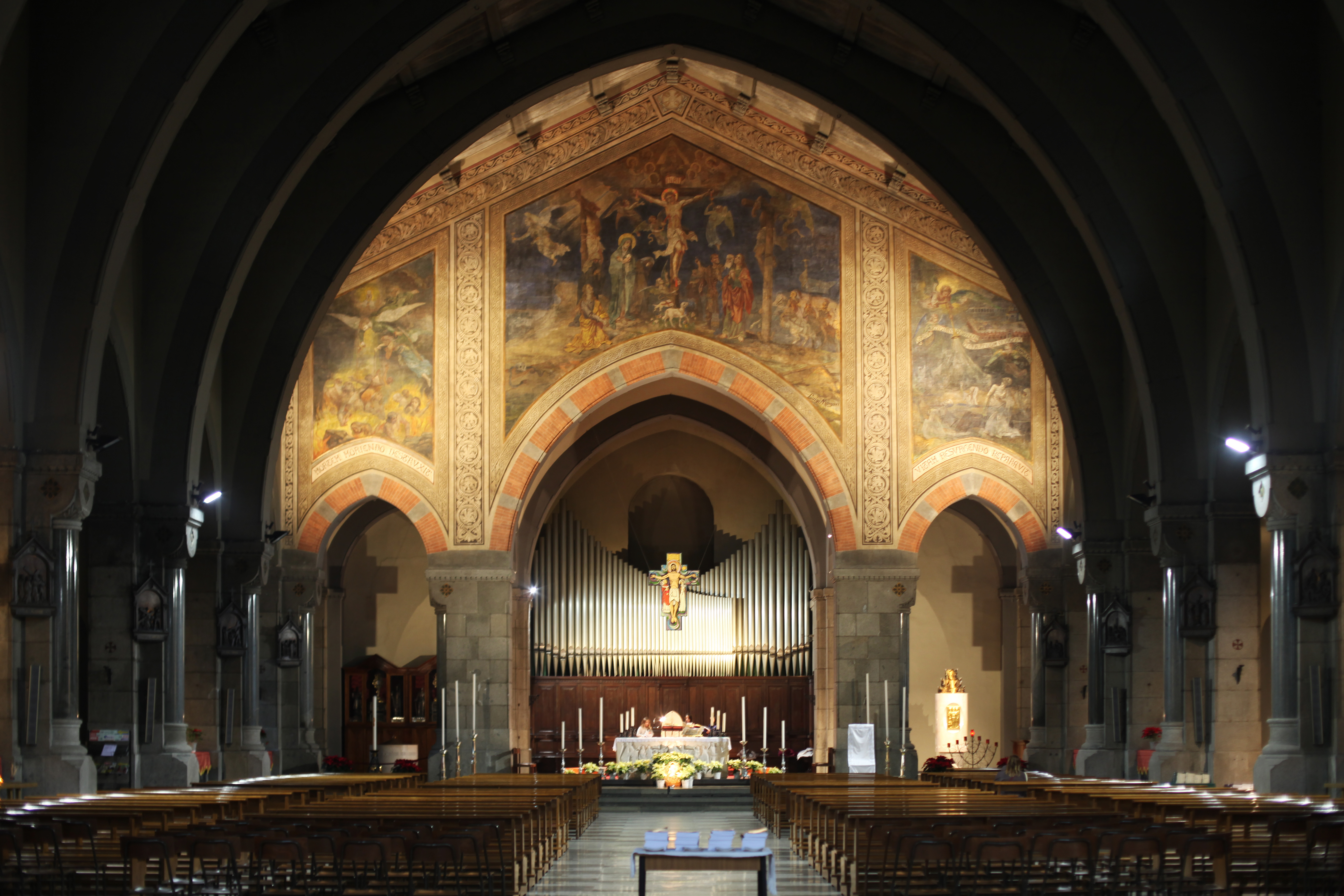 Veduta dell'interno della chiesa di San Gregorio Magno, Milano